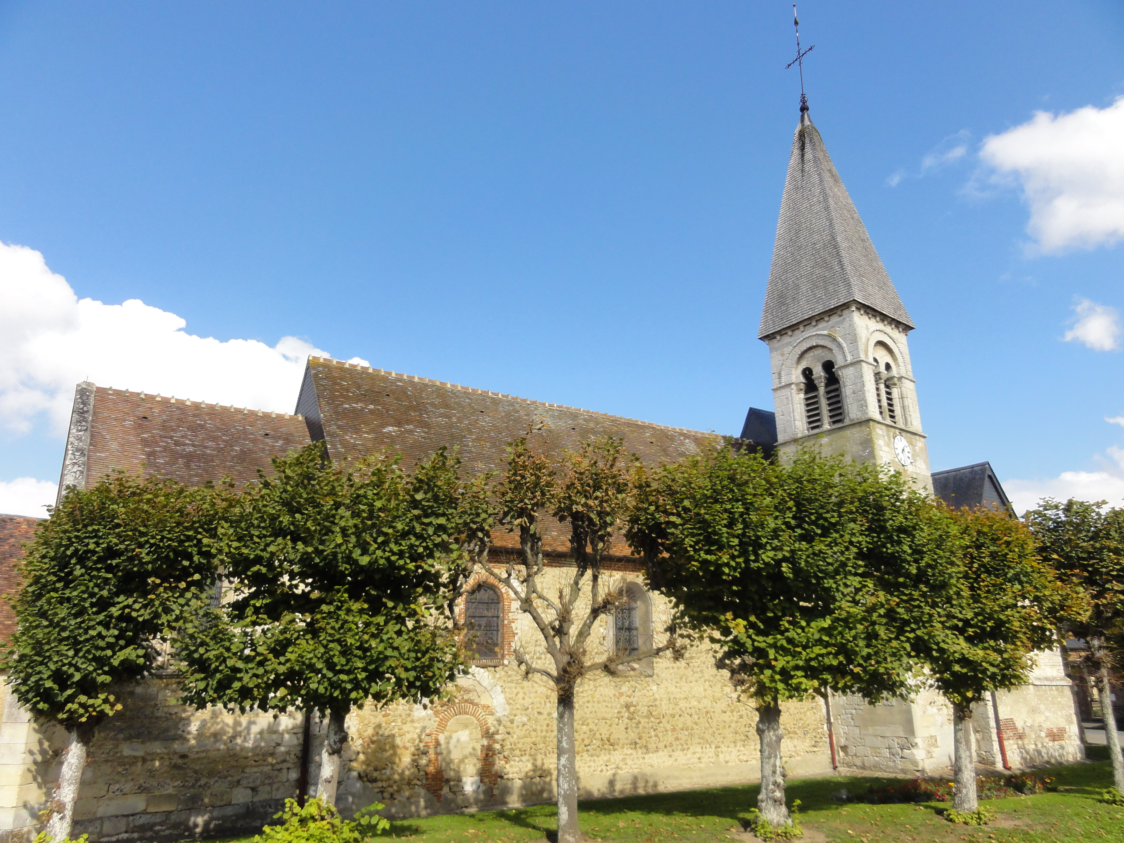 Église Saint-Lucien de Warluis - voir titre.